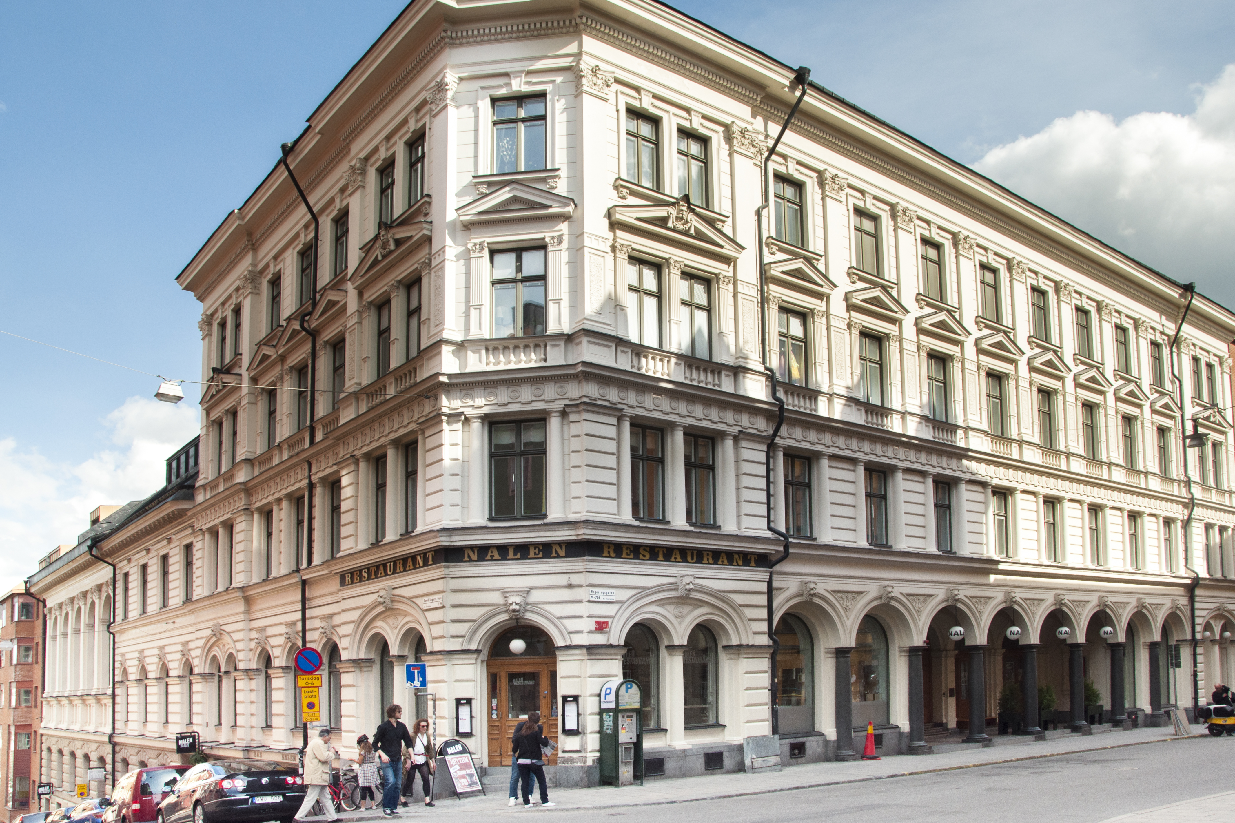 Nalen. kv. Österbotten 2 Regeringsgatan 72, 74, David Bagares gata 19. Byggnadsår 1886-87, arkitekt Gustaf Adolf Fristedt , byggherre Samfundet Enighet och Vänskap, byggmästare C A Sandberg.